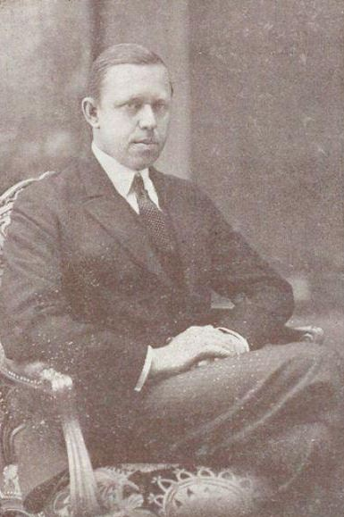 Yrjö Saastamoinen